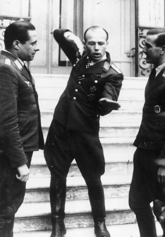 "So stiess ich auf die Engländer herunter" Hauptmann [Helmut] Wick, einer der erfolgreichsten deutschen Jagdflieger, den der Führer mit dem Eichenlaub zum Ritterkreuz auszeichnete, erzählt hier seinen Kameraden genau den Verlauf des Kampfes bei seinem letzten Abschuss. Bekanntlich konnte Hauptmann Wick an einem einzigen Nachmittag nicht weniger als fünf Luftsiege erringen. 22.10.1940 [Herausgabedatum!]